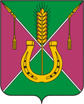 Герб Кореновска, Краснодарский край, Россия.